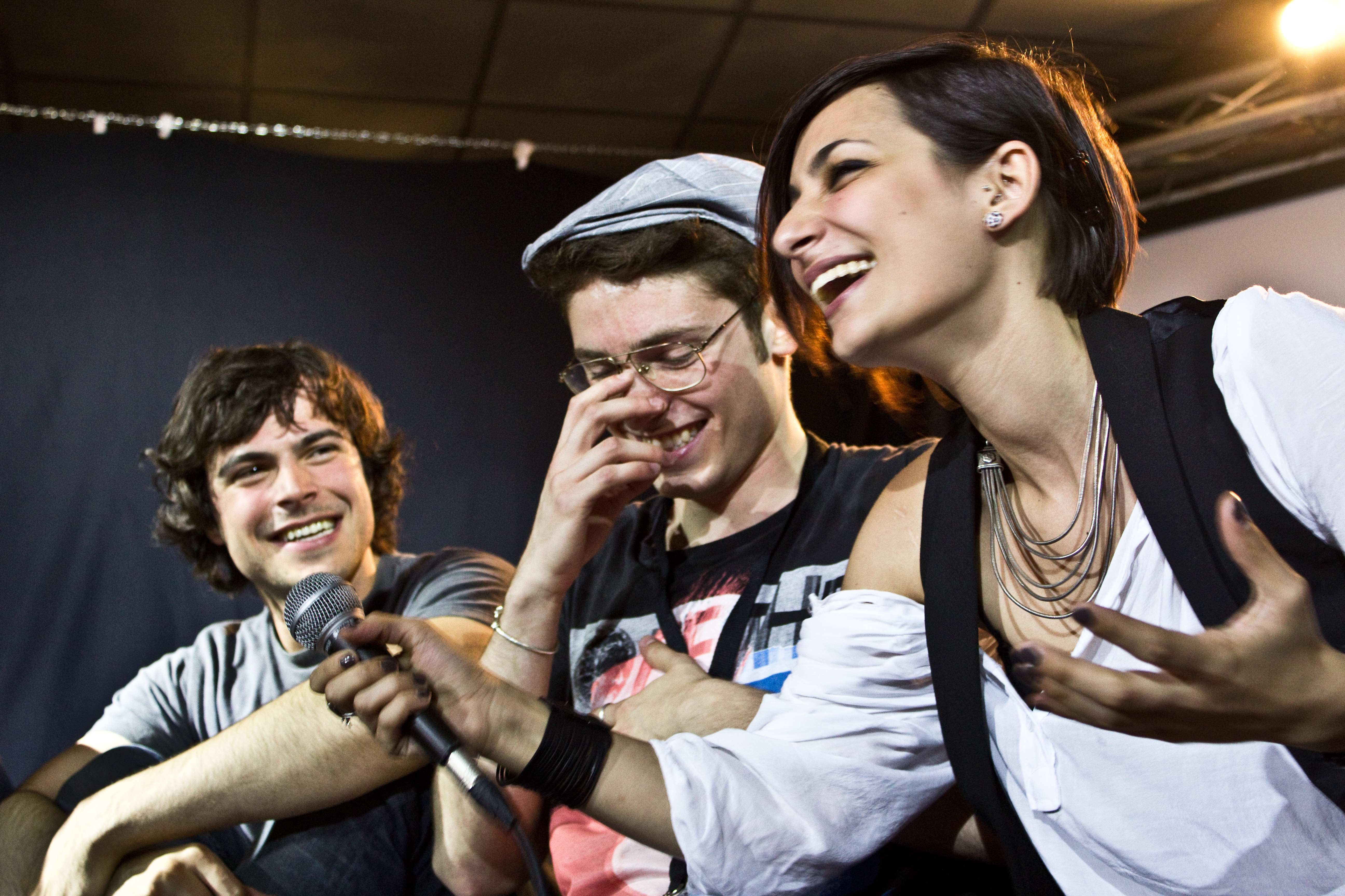 Secret Show di Freaks al Blackout di Roma. Nella foto Guglielmo Scilla aka Willwoosh (che interpreta Marco Diana), Andrea Poggioli (Andrea Tarantini) e Claudia Genolini (Viola Cesa de Castaldo).